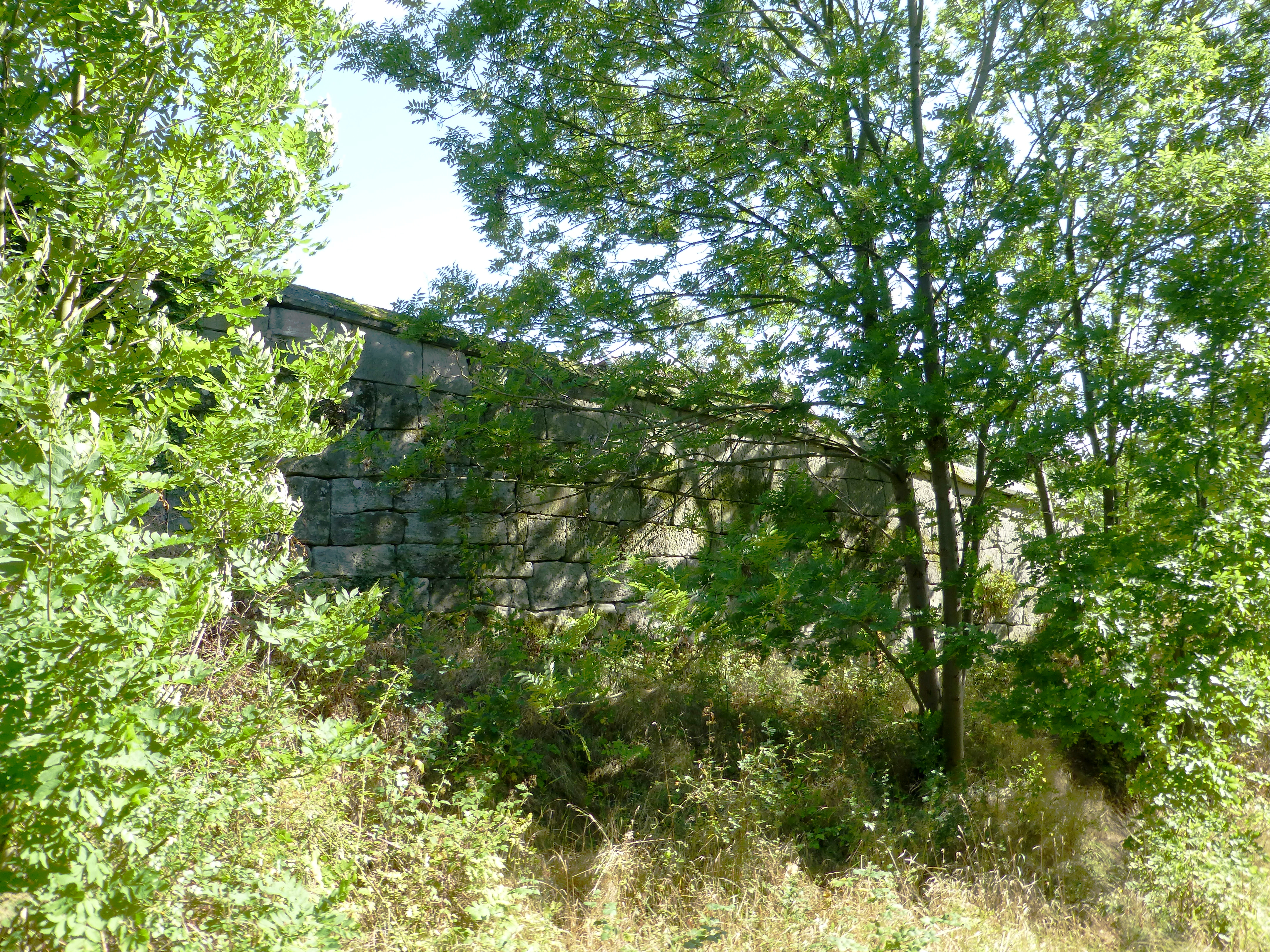 Natursteinmauer des ehemaligen Klosters Teistungenburg, Landkreis Eichsfeld